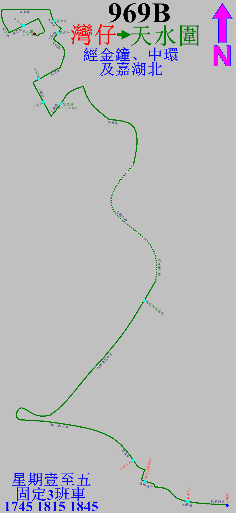 中文（香港）: 過海隧巴969B線新界方向的走線圖